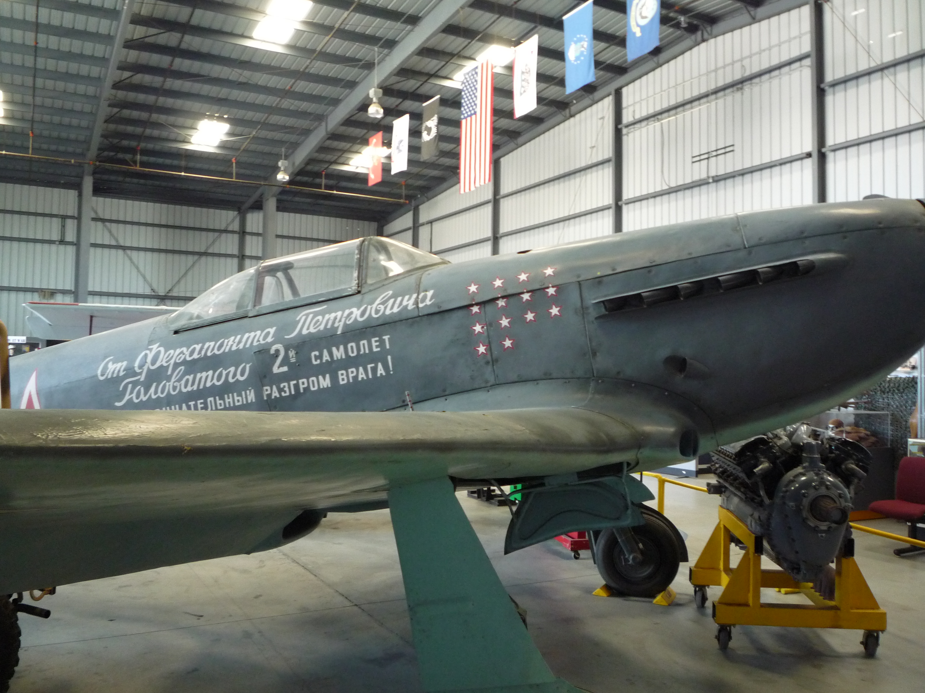 Второй самолёт, построенный на деньги Ферапонта Петровича Головатого, хранящийся в авиационном музее в Калифорнии, США